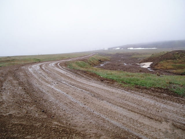 Дорога Полярный-Ленинградский